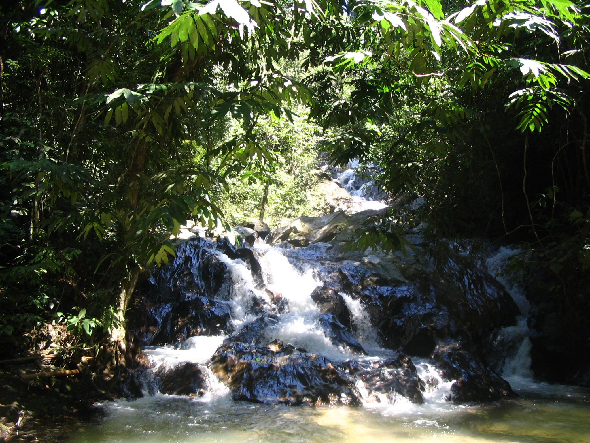 Templer Park: bassin aménagé, Selangor, Malaysia